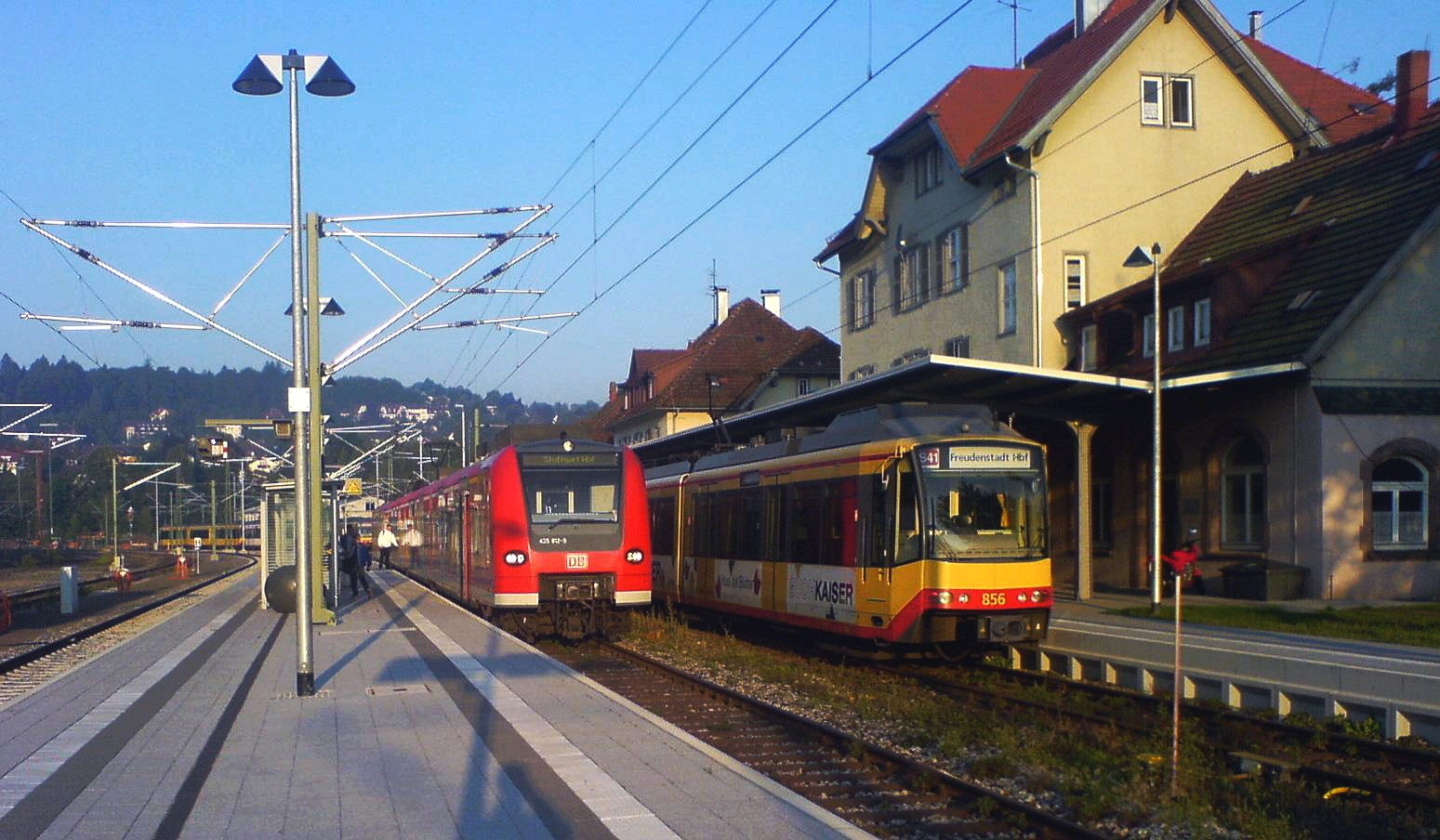 Freudenstadt Hauptbahnhof - Freudenstadt Main Station